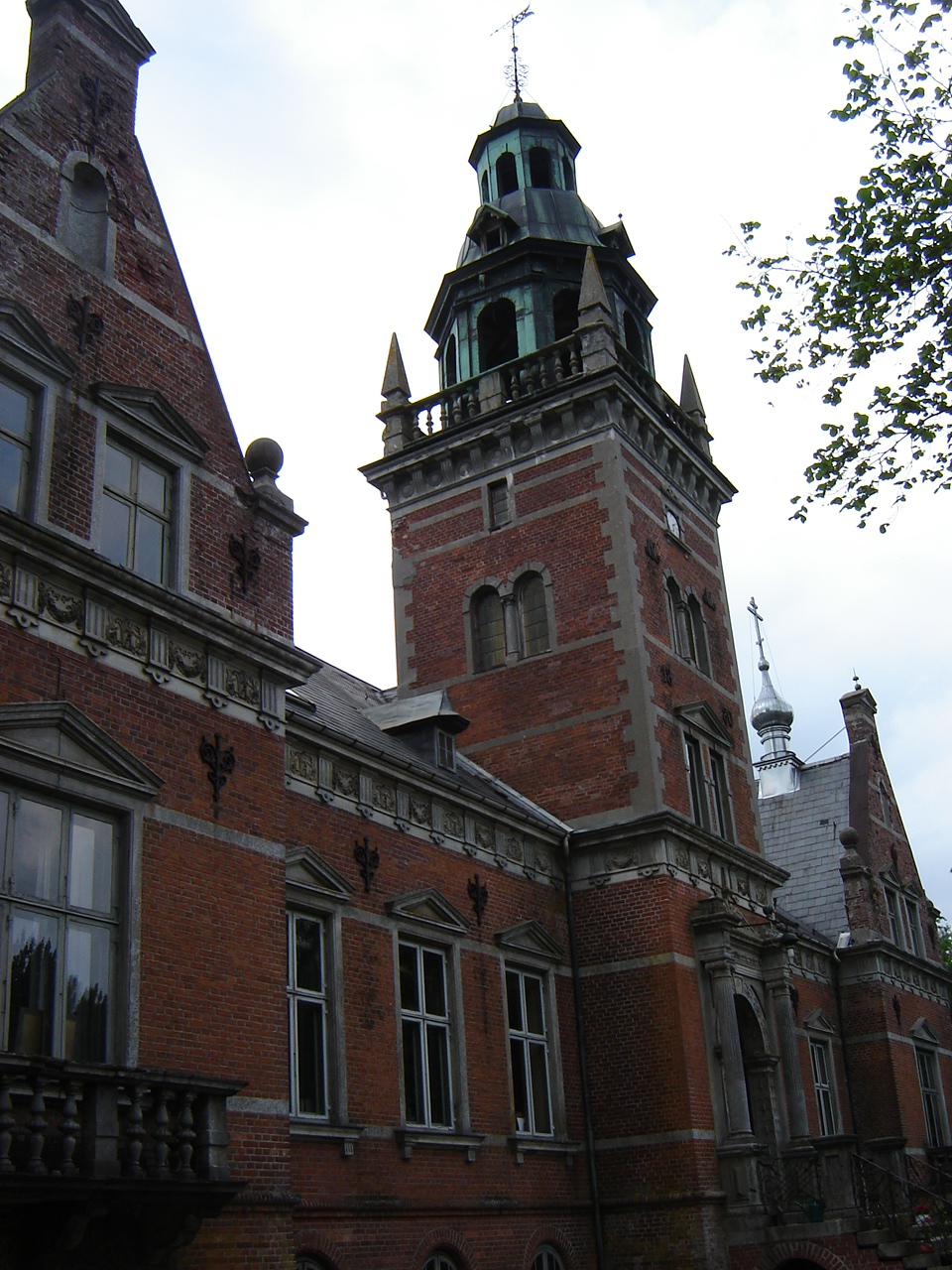 Billede af det store tårn på Hesbjerg Slot. Man skimter det lille ortodokse kubel til højre i billedet.